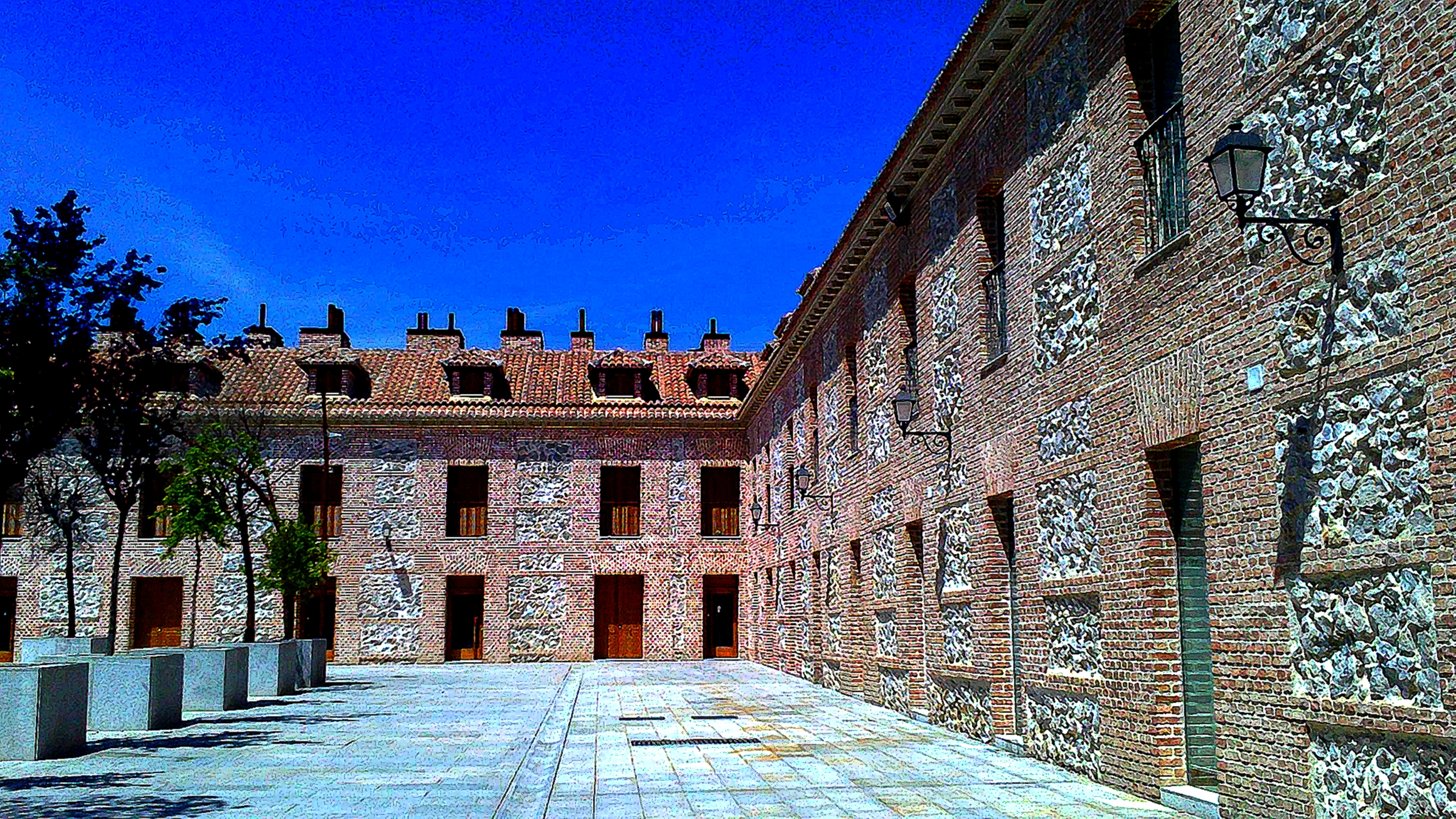 Casas de la plaza de España, recientemente restauradas, con sus muros de fábrica historiada y encajonados de pedernal.